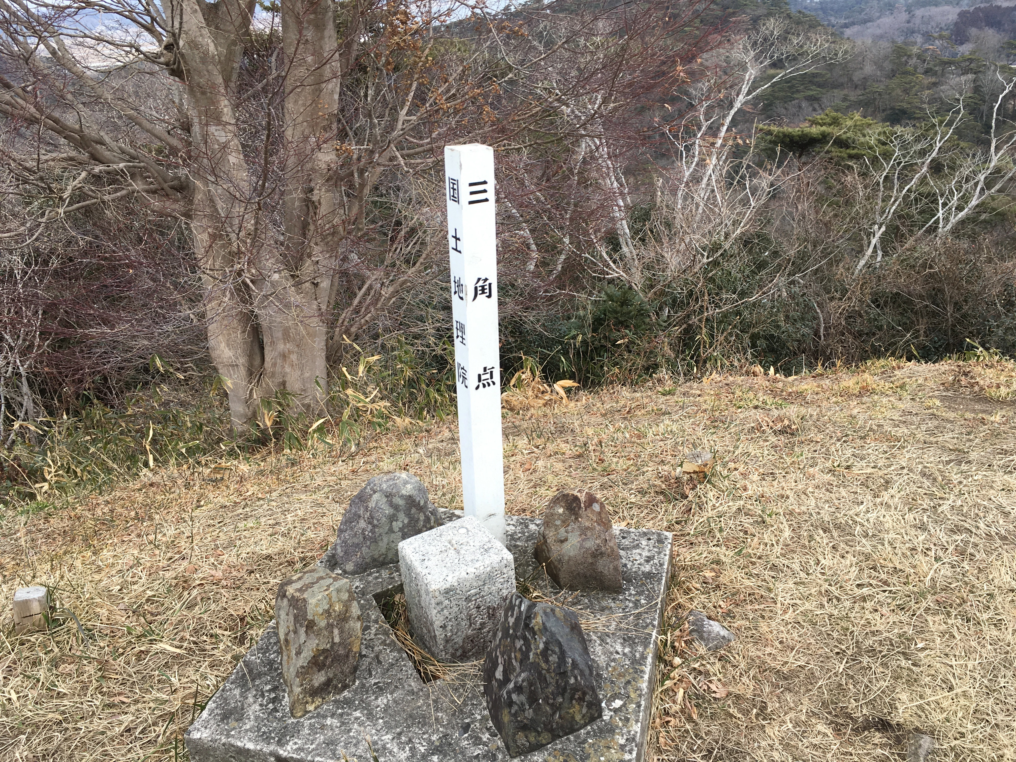 大高森山頂の二等三角点です（標高105.22m）